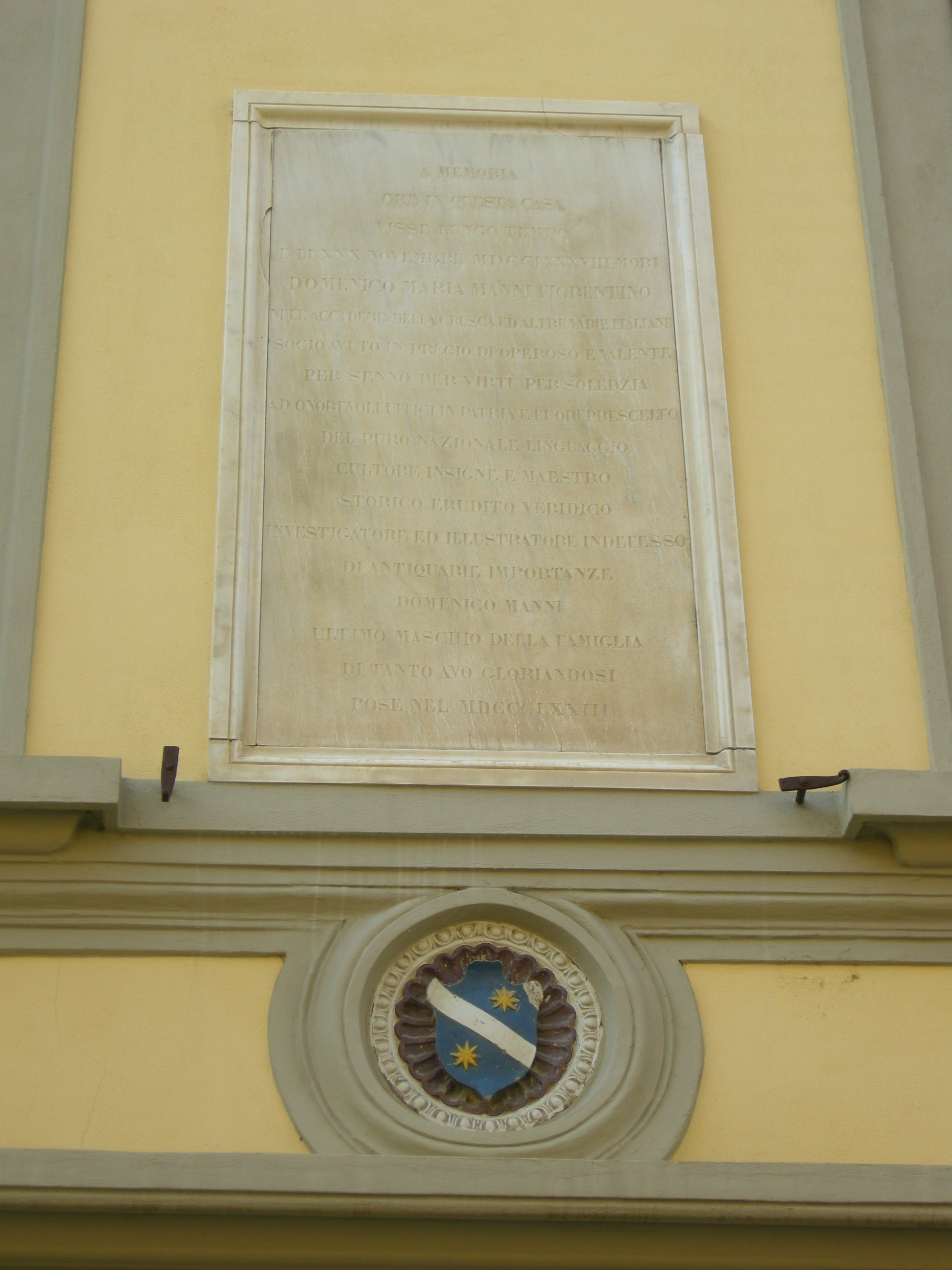 Via della chiesa, stemma e targa a domenico manni